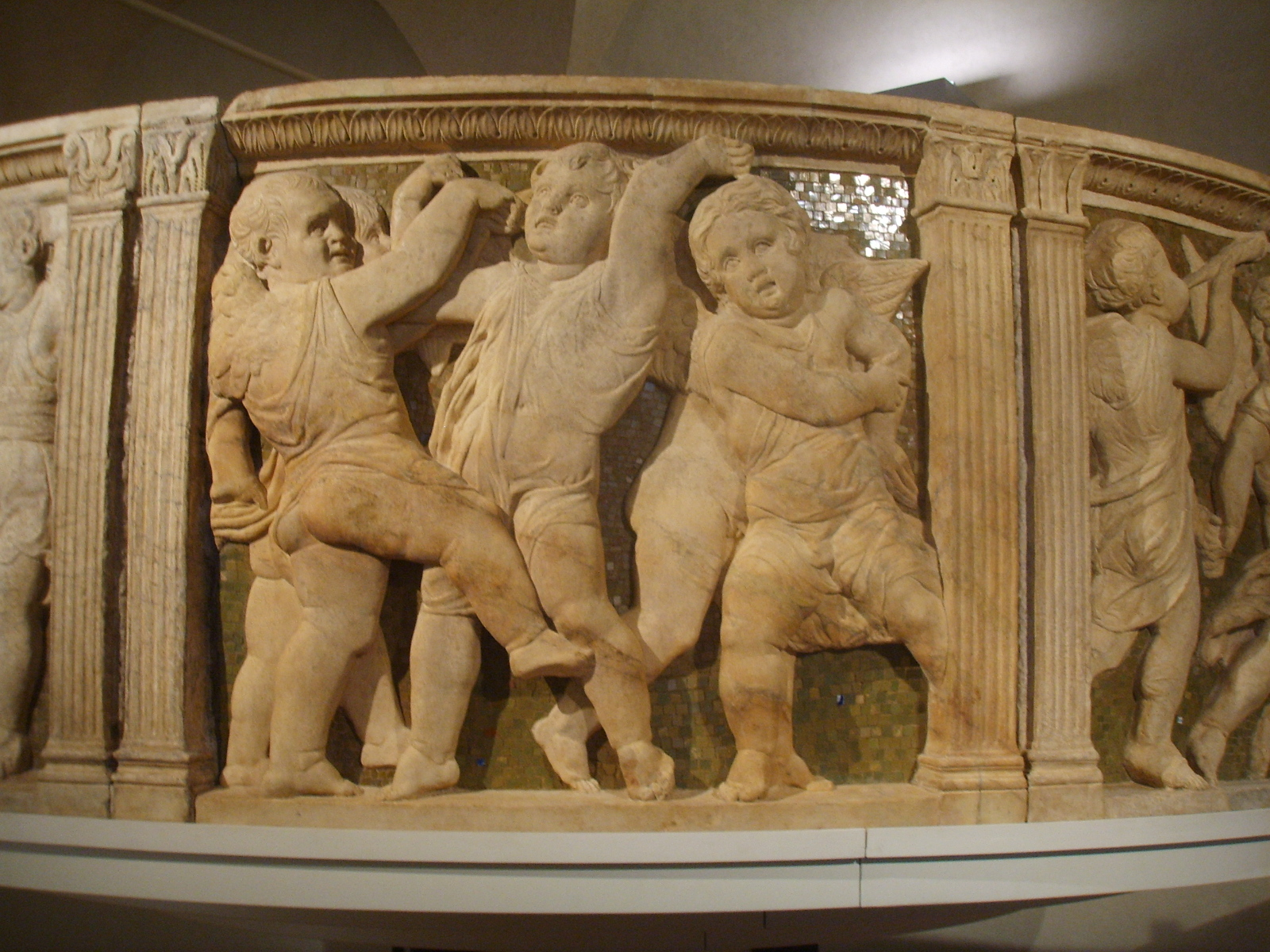 Pulpito di donatello (prato), formella